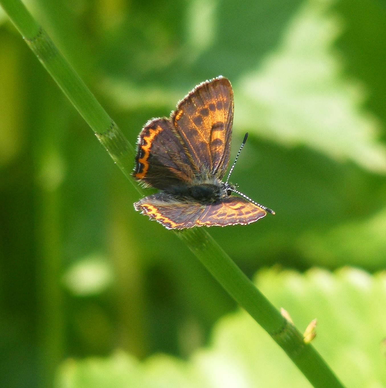 Blauschillernder Feuerfalter 2. Blauschillernde Feuerfalter im Feuchtgebiet bei Simmerath 2010 Vorderflügellänge 12 bis 14 mm.